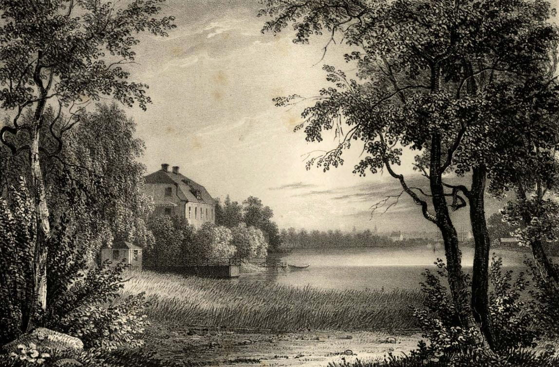 Sirishov i Stockholms pittoreska omgifningar tecknade efter naturen: lithographierade samt Hans Kongl. Höghet Kron-Prinsen af Sverige och Norrige Joseph Frans Oscar i djupaste underdånighet tillegnade: första afdelningen Kongl. Djurgården / af C. J. Billmark